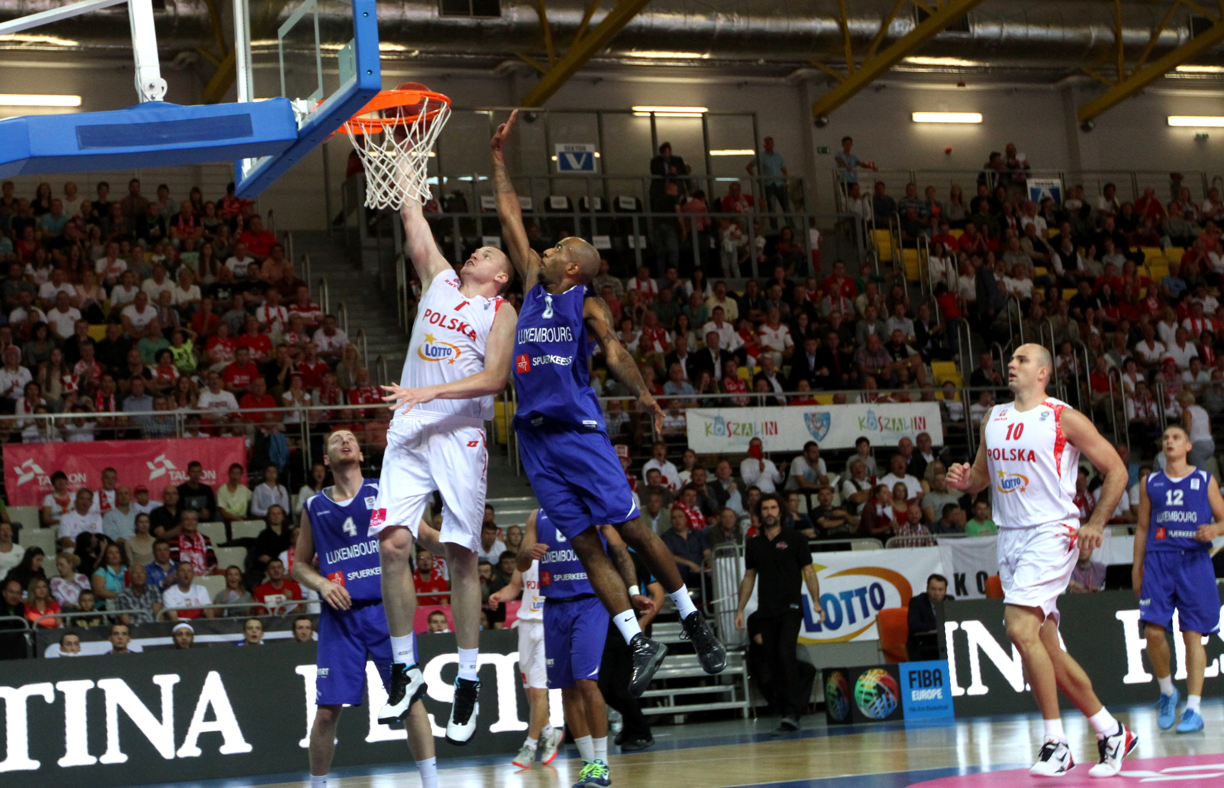 Eliminacje do EuroBasketu 2015: Polska – Luksemburg, Koszalin, 27 sierpnia 2014. Damian Kulig